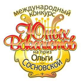 Эмблема